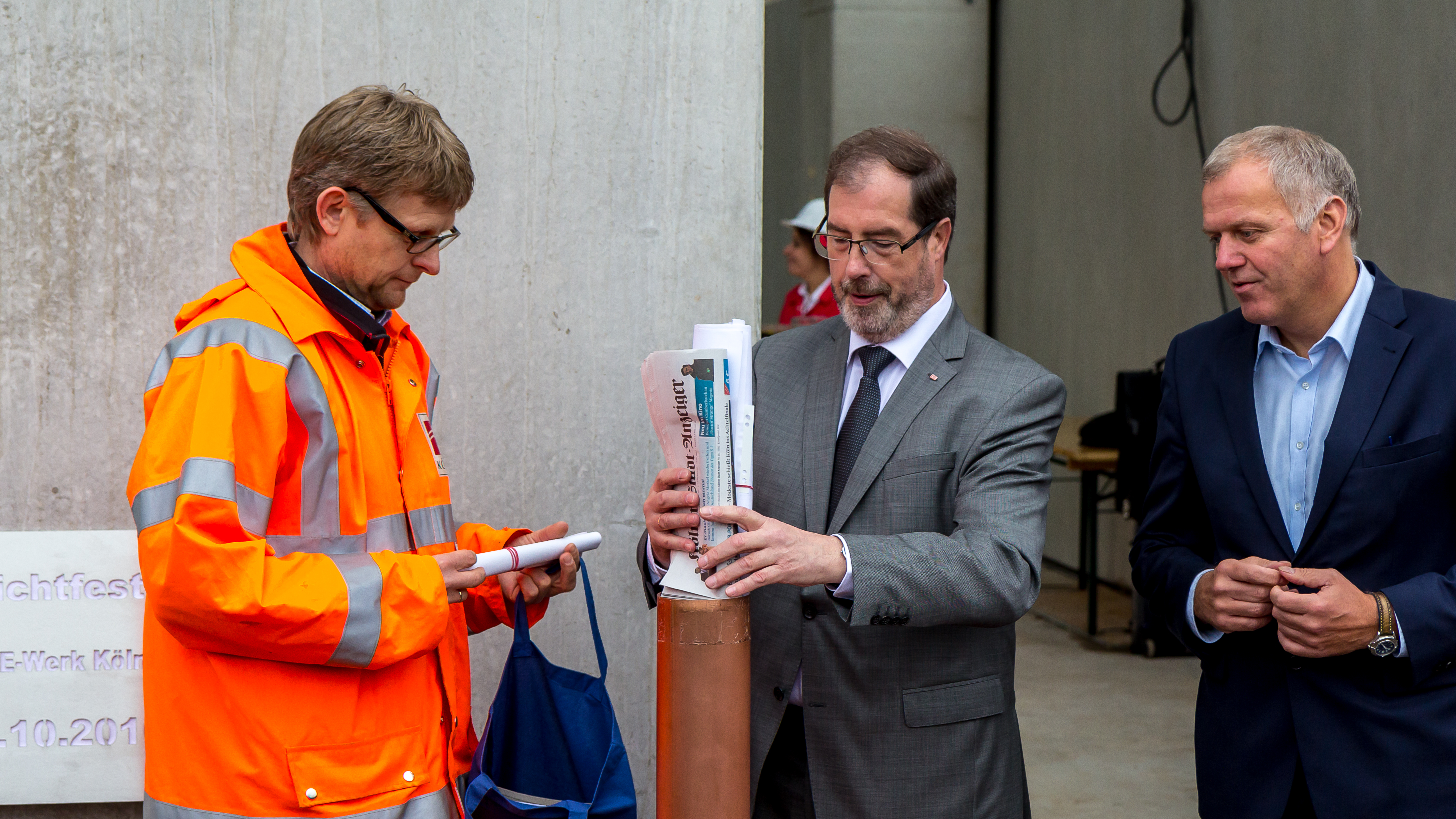 Richtfest ICE-Instandhaltungswerk Köln-Nippes